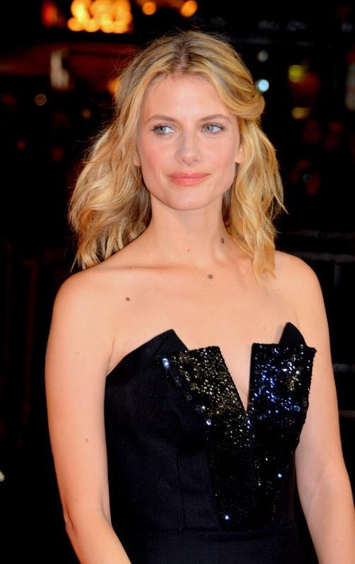 Mélanie Laurent à la cérémonie des César